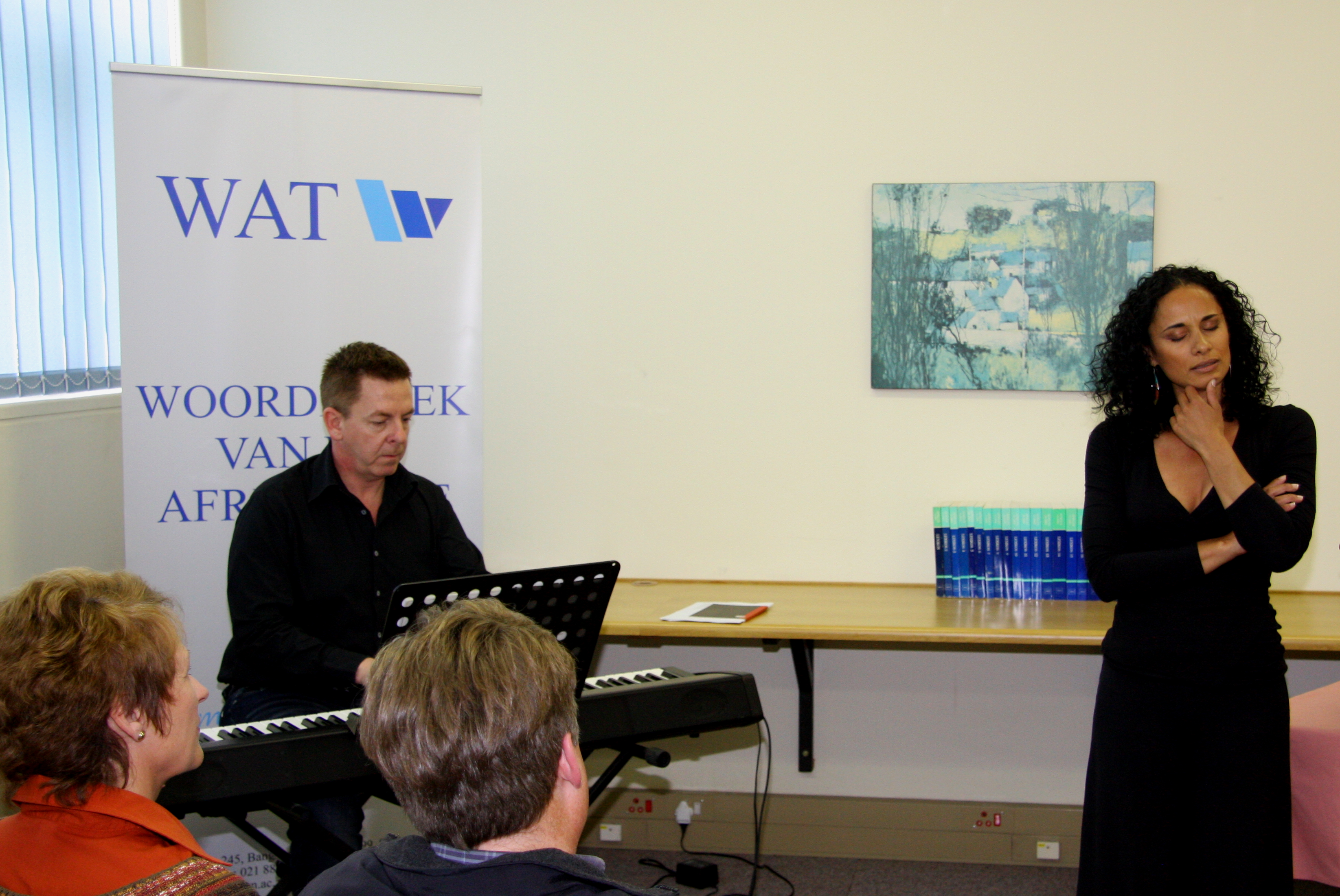 Charlene Truter